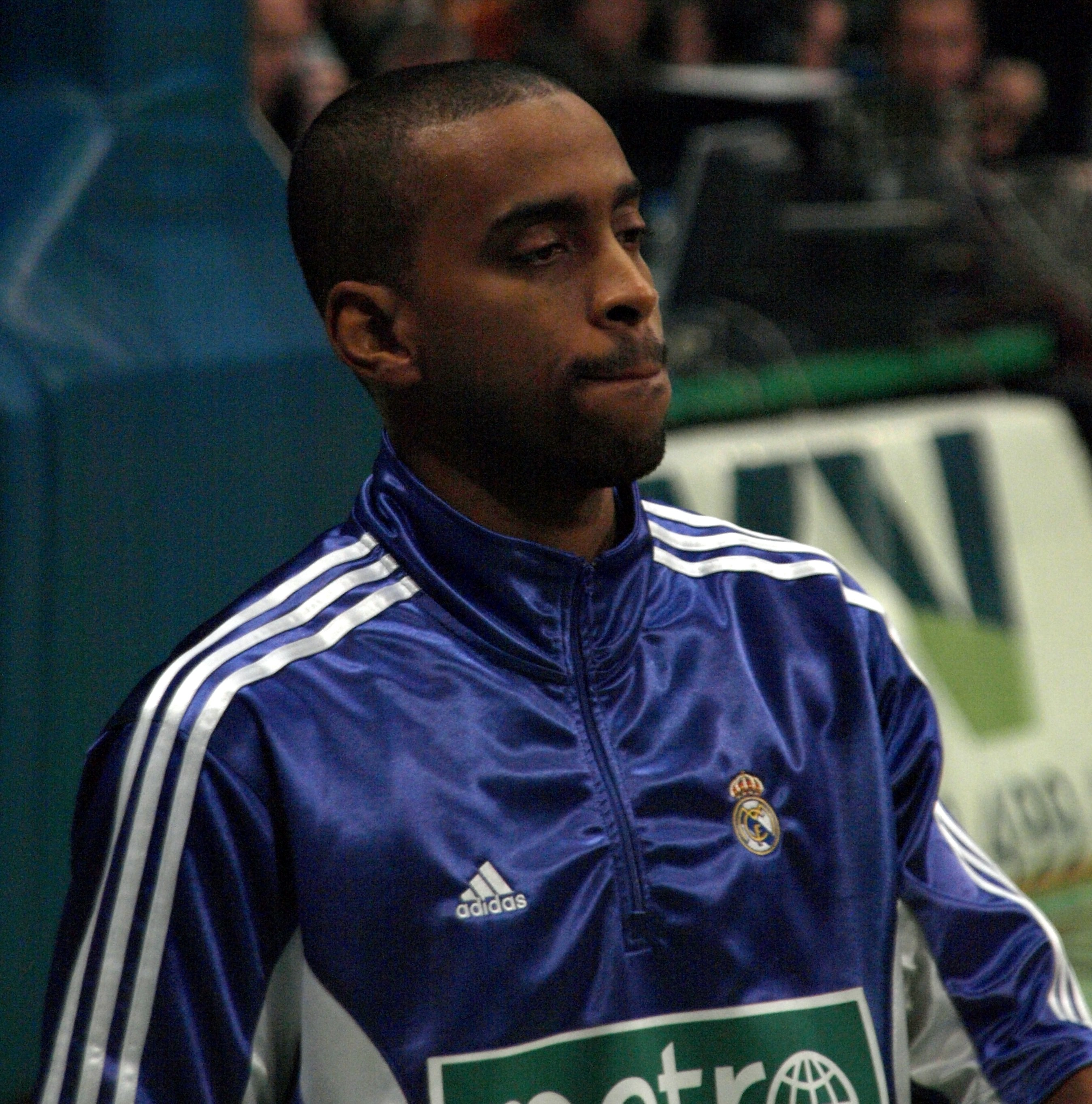 Louis Bullock del Real Madrid en una imagen tomada en el Olímpico de Badalona